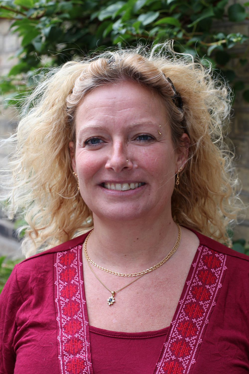 Monika Ekström, miljöpartist